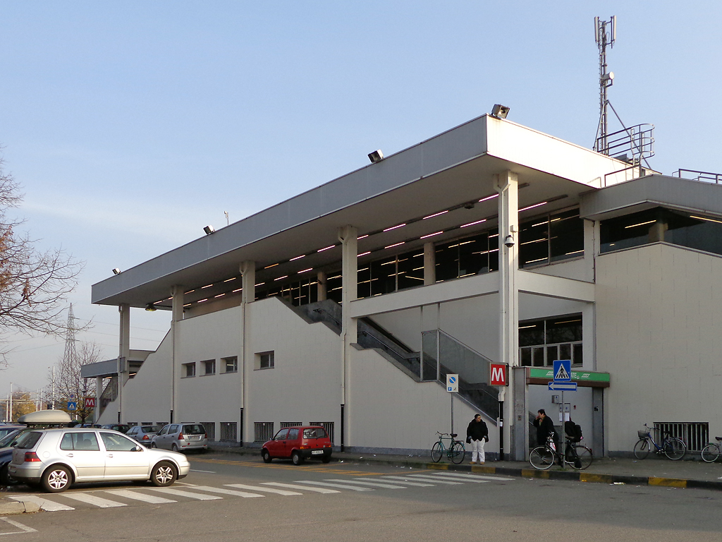 Stazione di Gessate della metropolitana di Milano, ingresso lato nord.